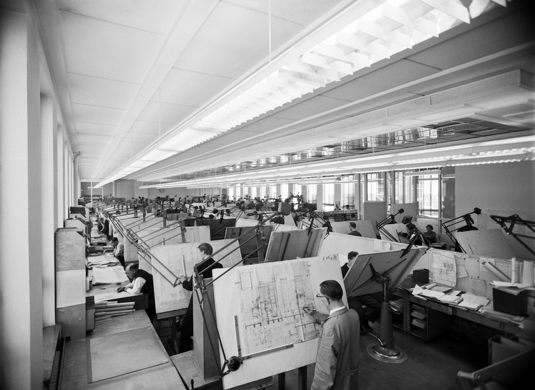 Alkuperäinen kuvaus: Oy Wärtsilä - yhtymä Ab, Kone ja Silta. Sisäkuva piirrustuskonttorista.